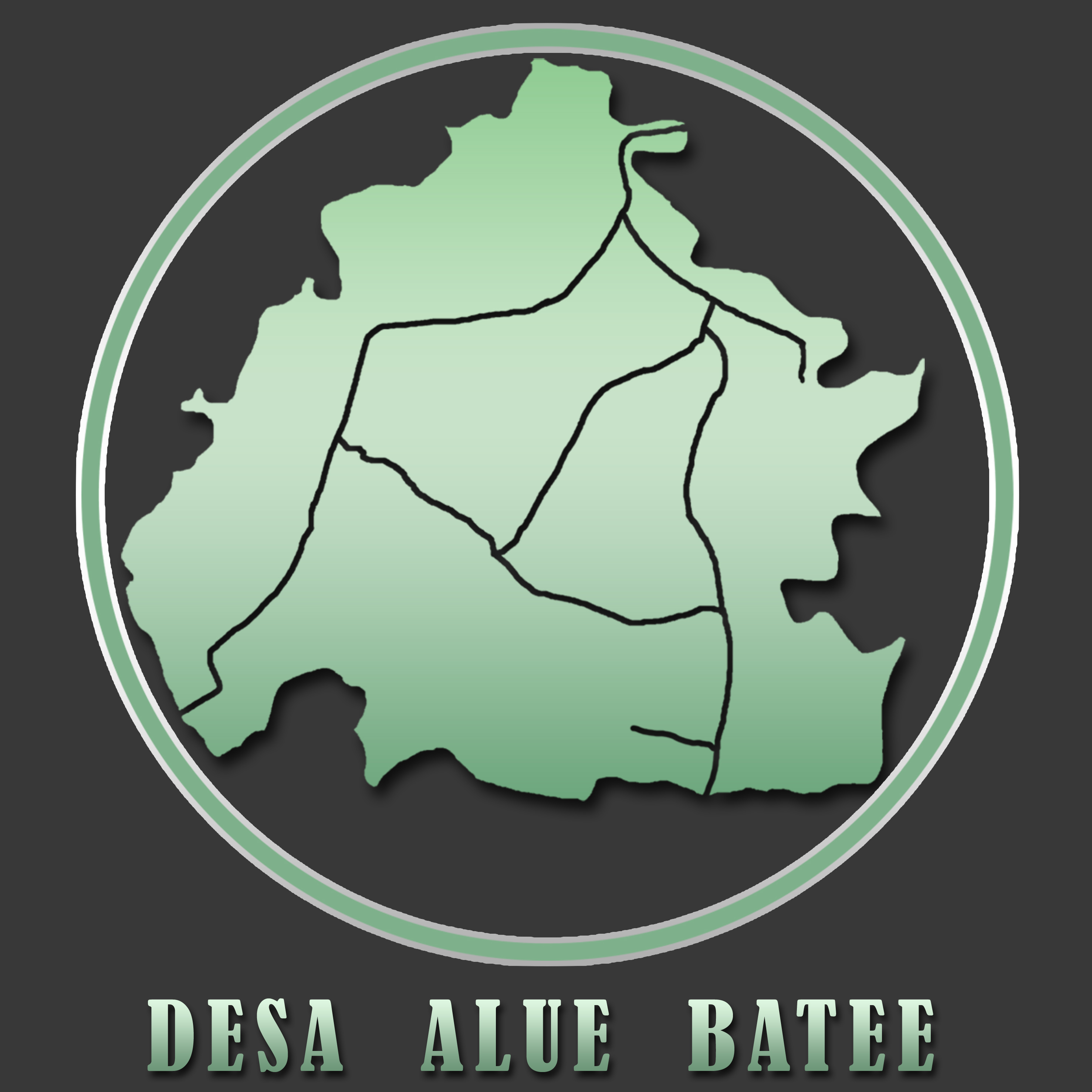 Peta Wilayah Desa Alue Batee